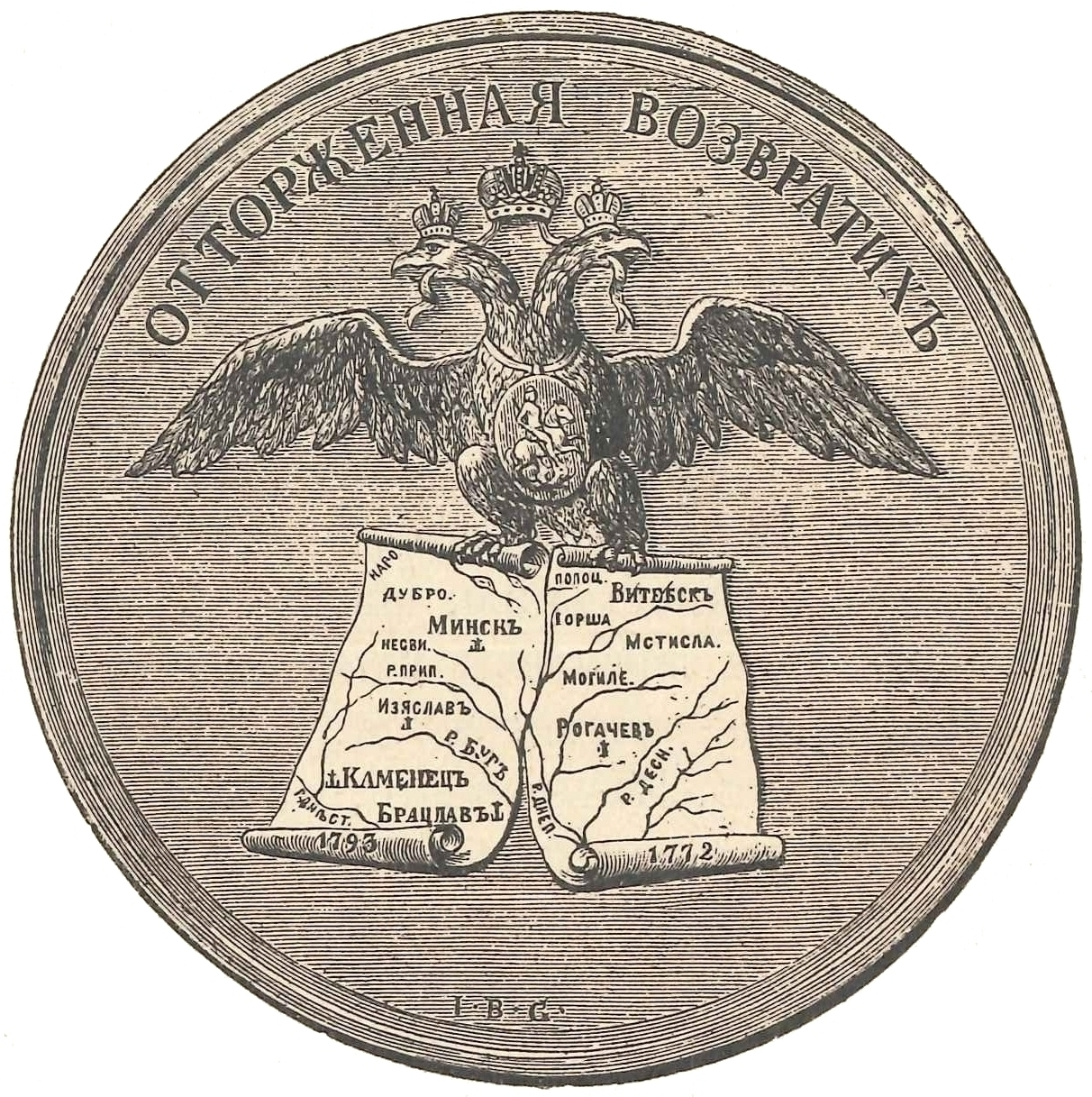 Медаль в память воссоединения западно-русских областей при Екатерине II.